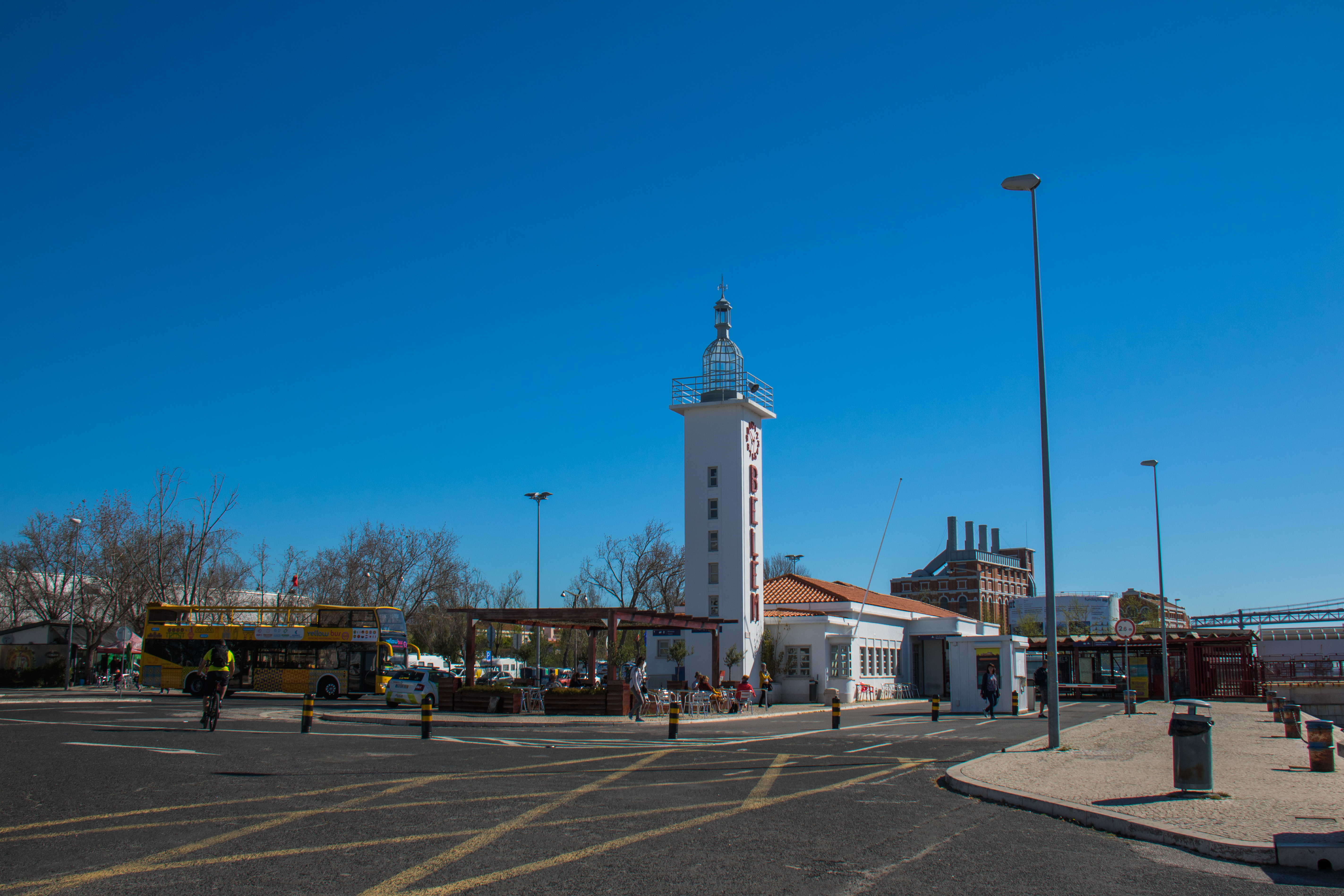 Belem